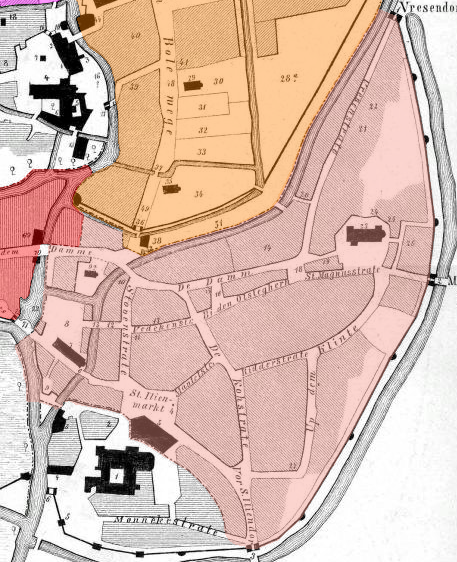 Die Altewiek um 1400 auf einer historischen Karte (Hellrot eingezeichnet)